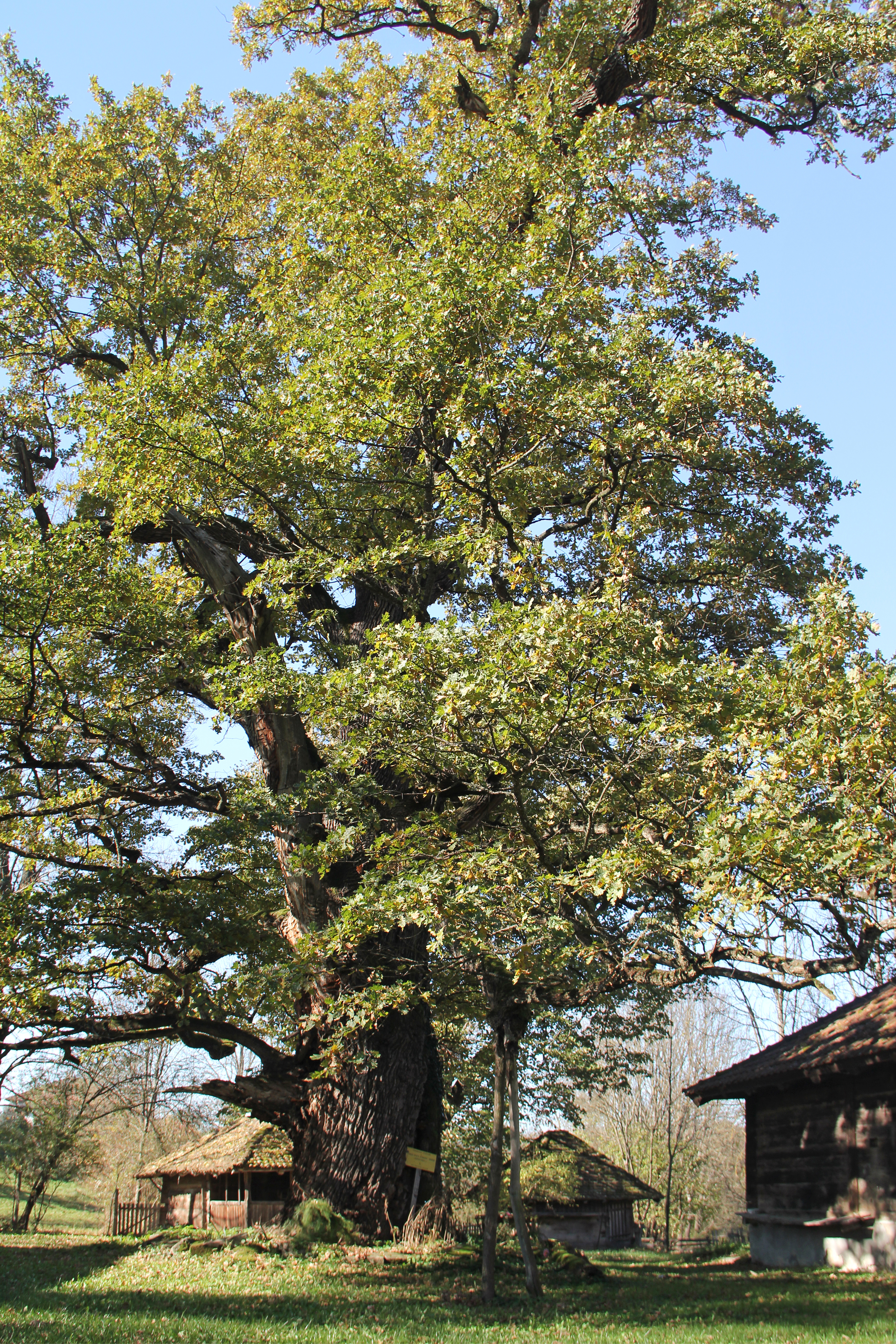 Lunjevica